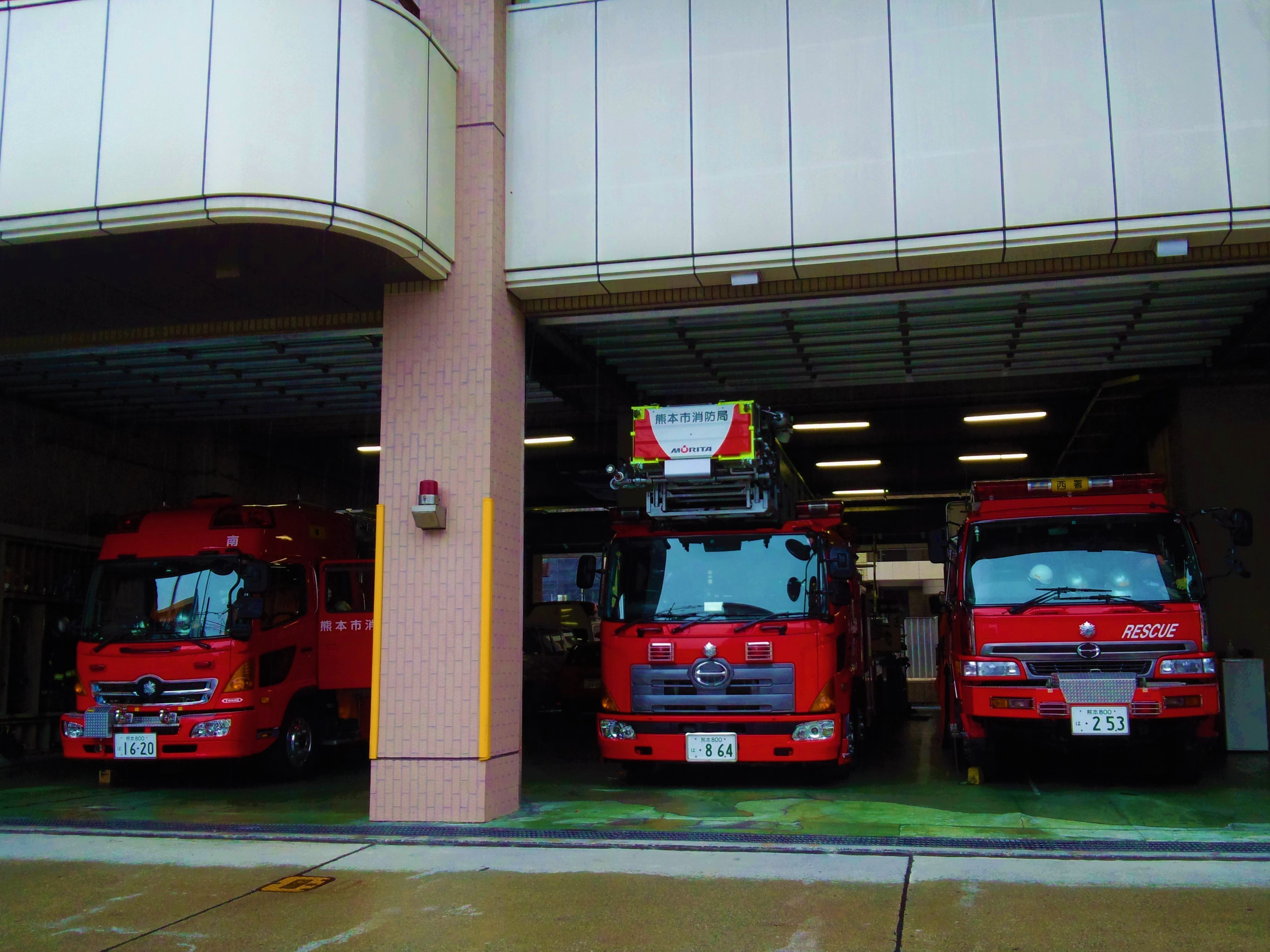 熊本市消防局、南消防署の救助工作車（左）と西消防署のはしご車（中）、救助工作車（右）